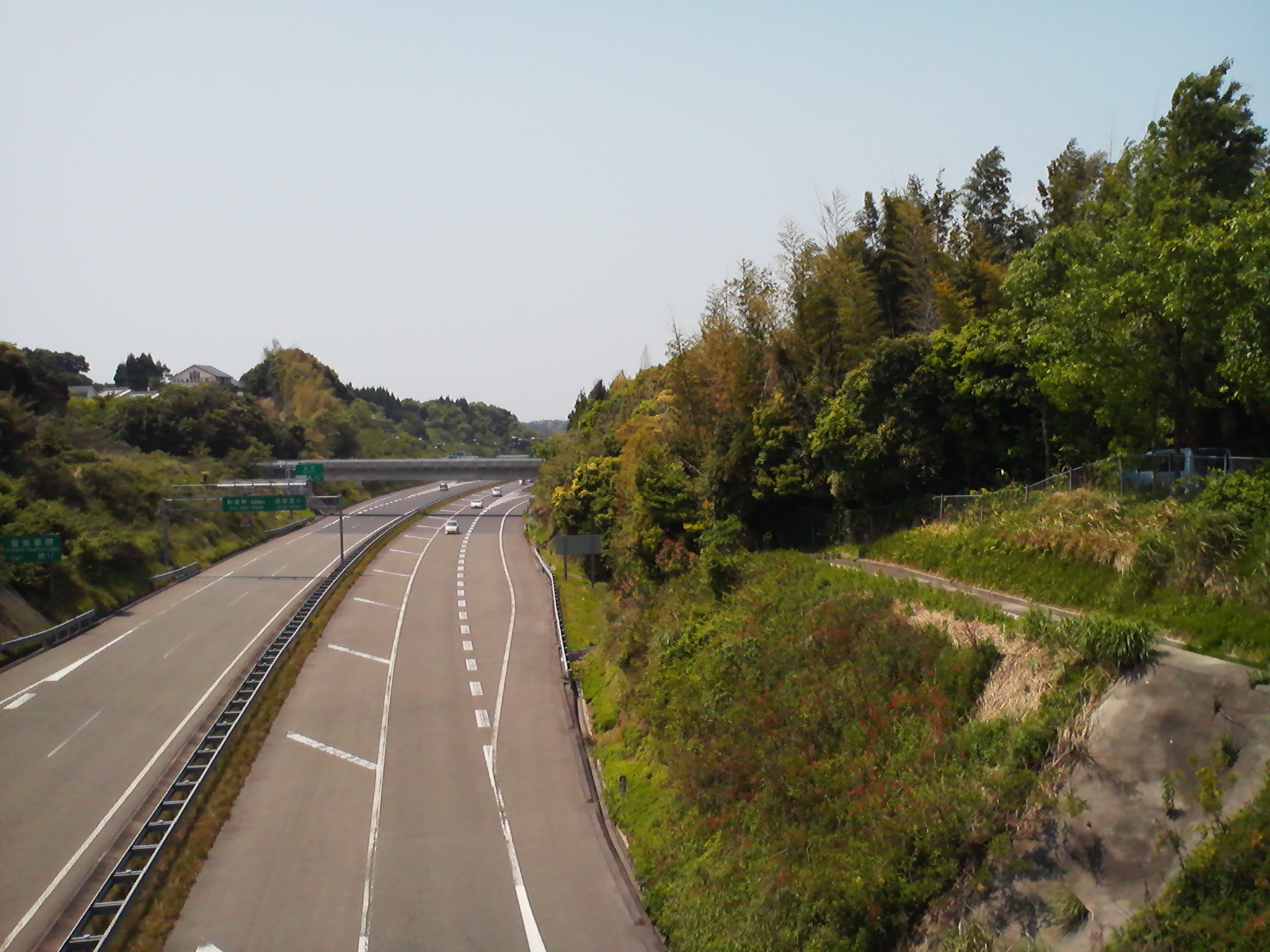 南九州西回り自動車道の松元本線料金所方面を眺める。